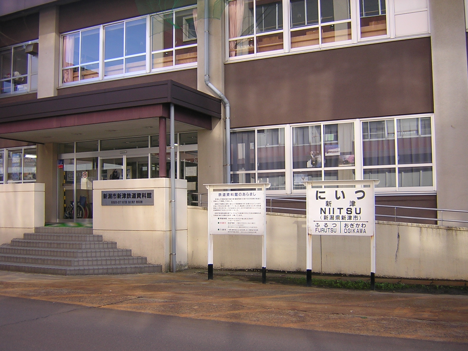 新潟市新津鉄道資料館入口。